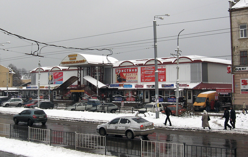 Привокзальный рынок во Львове